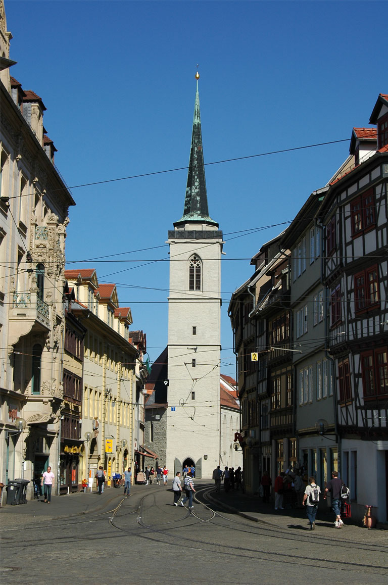 Westturm der Allerheiligenkirche (errichtet 1125) an der Ecke Marktstraße/Allerheiligenstraße in Erfurt